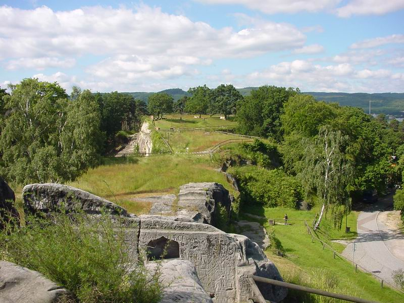 Regenstein - Blick auf die Scharfe Ecke